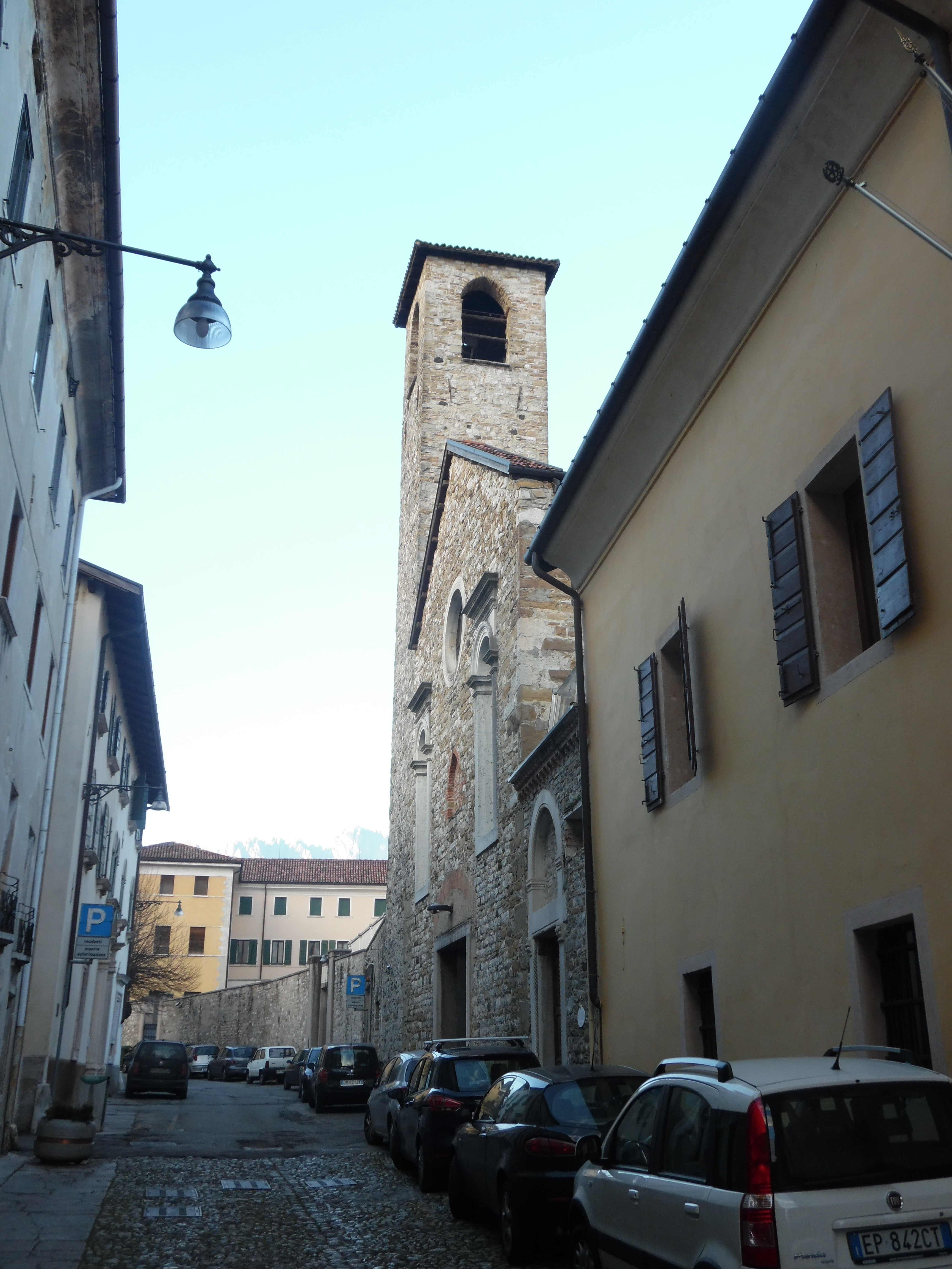 Autore: A. Roldo